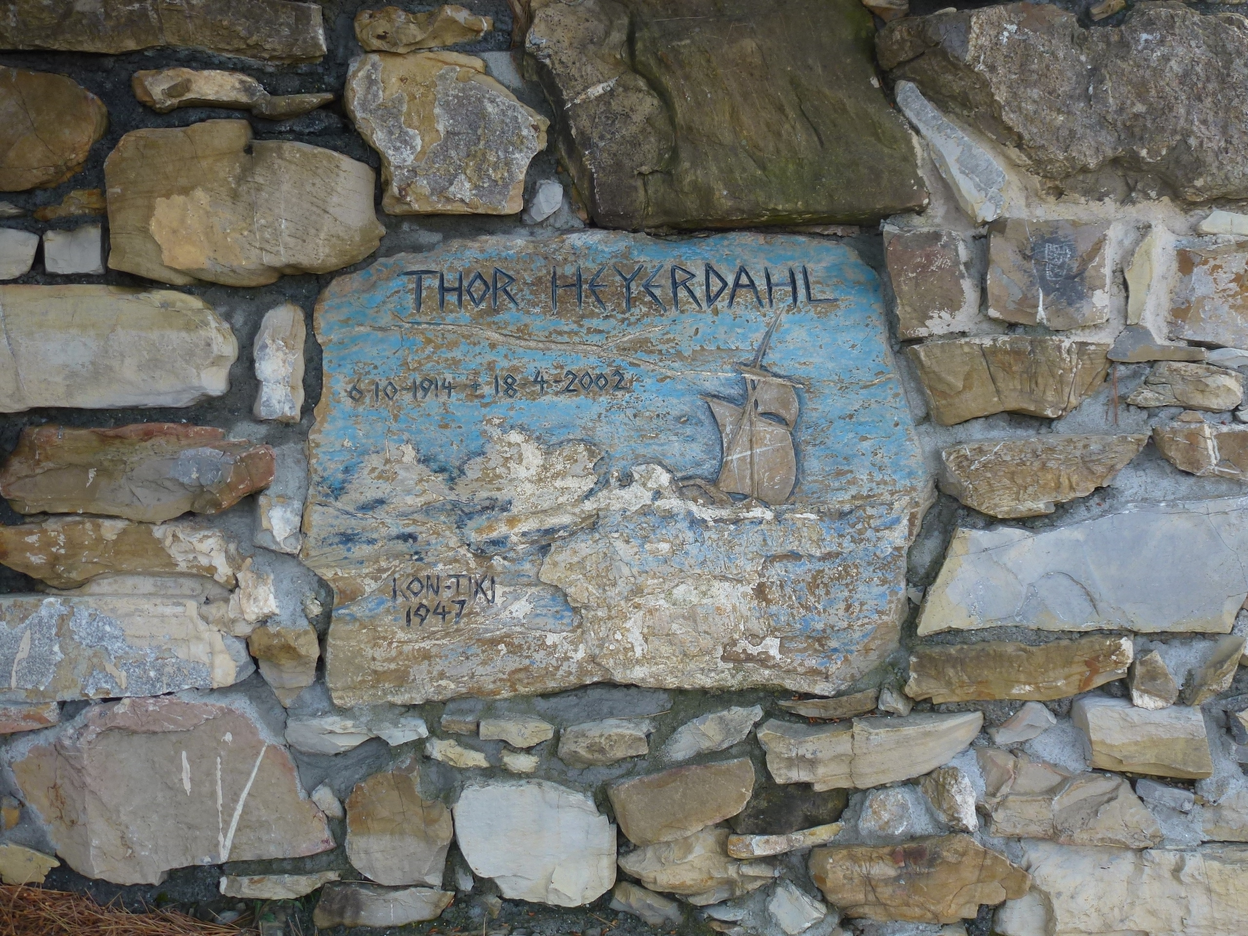 Gedenkstein für Thor Heyerdahl in der Nähe von Colla Micheri, wo er am 18.04.2002 starb